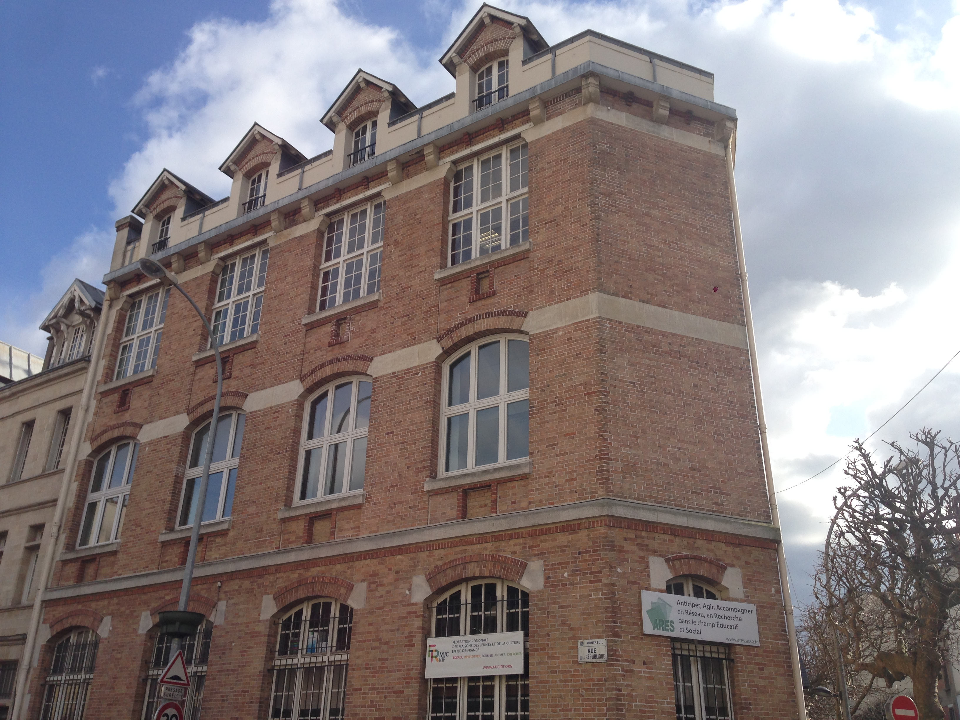 Immeuble du siège de la Fédération régionale des Maisons des Jeunes et de la culture en Ile-de-France.